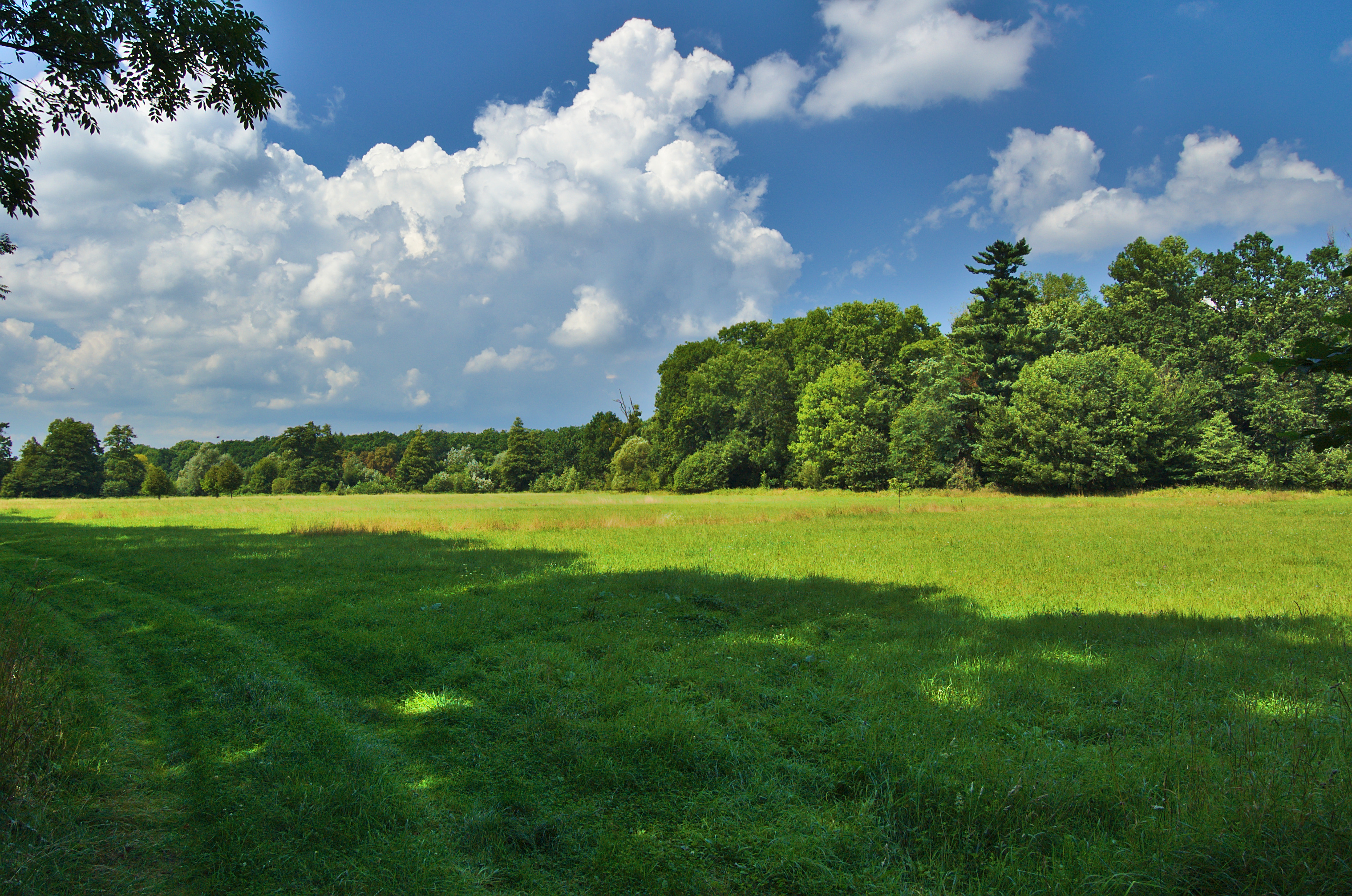 Přírodní památka Pod Templem, okres Olomouc